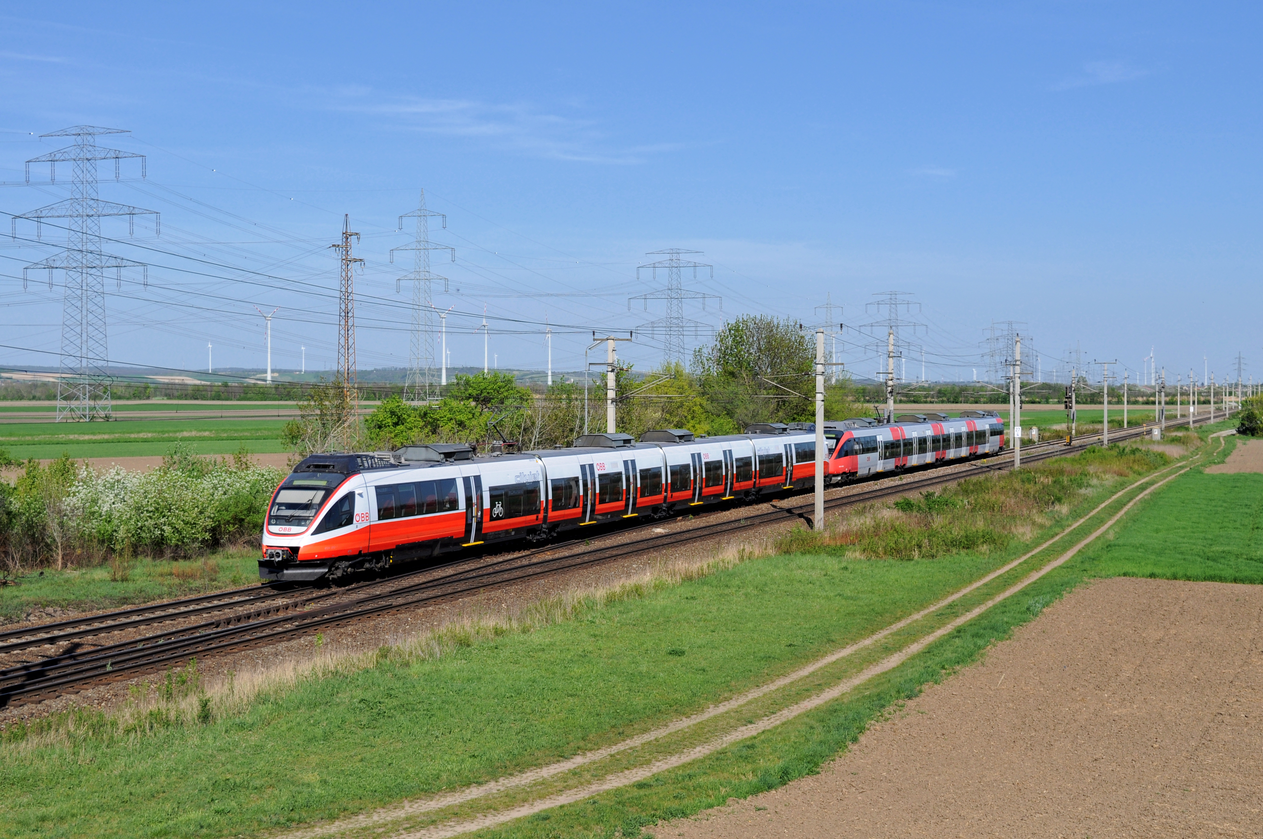 ÖBB 4124 012 im Cityjet-Design mit einem 4124 im alten Design als Regionalexpress am Bahnhof Götzendorf.